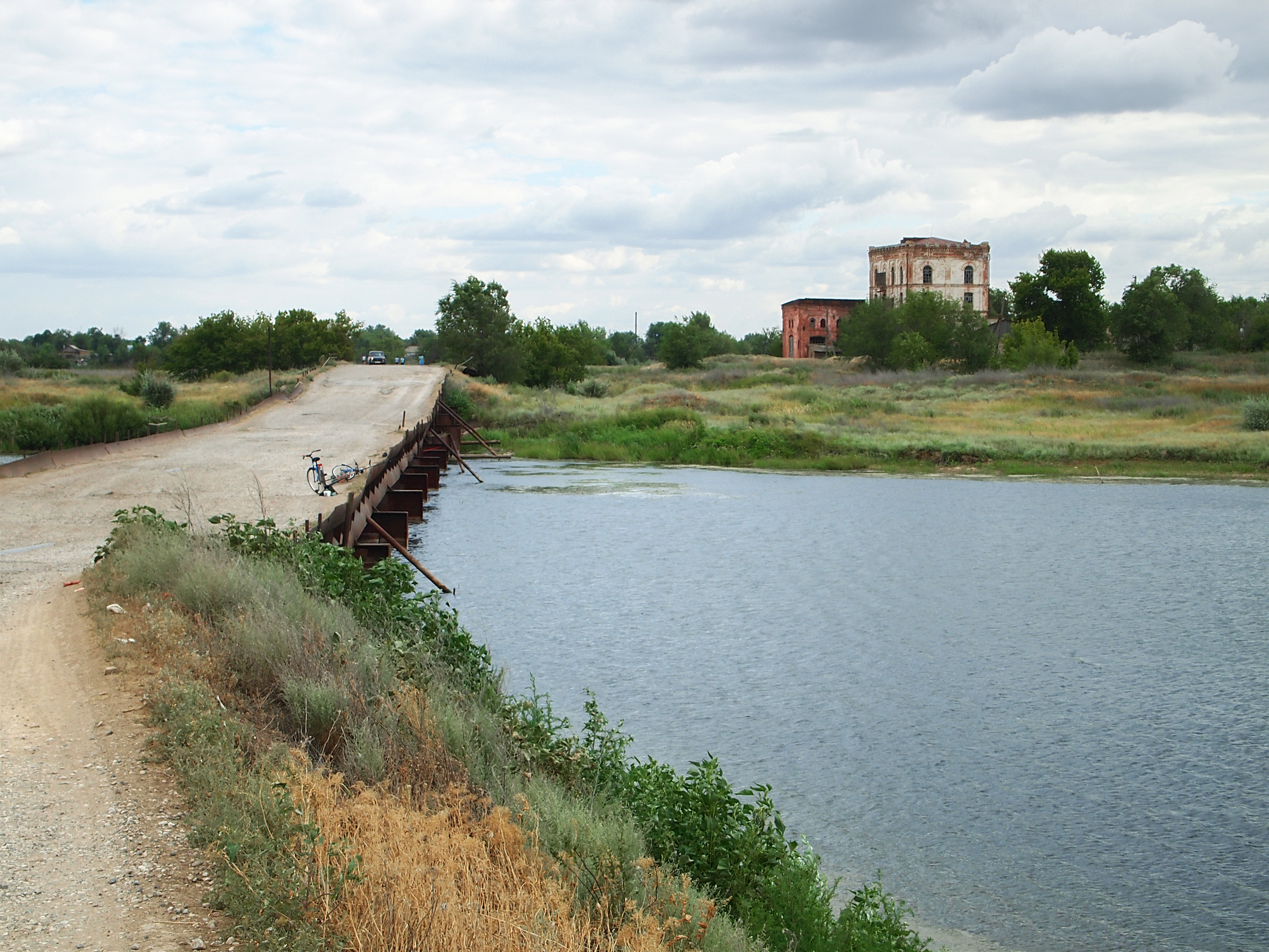 Мельница, в которой с 1 по 7 мая 1918 году оборонялись от уральских белоказаков красногвардейцы: Александров Гай, Александрово-Гайский район, Саратовская область Вид с берега Большого Узеня.